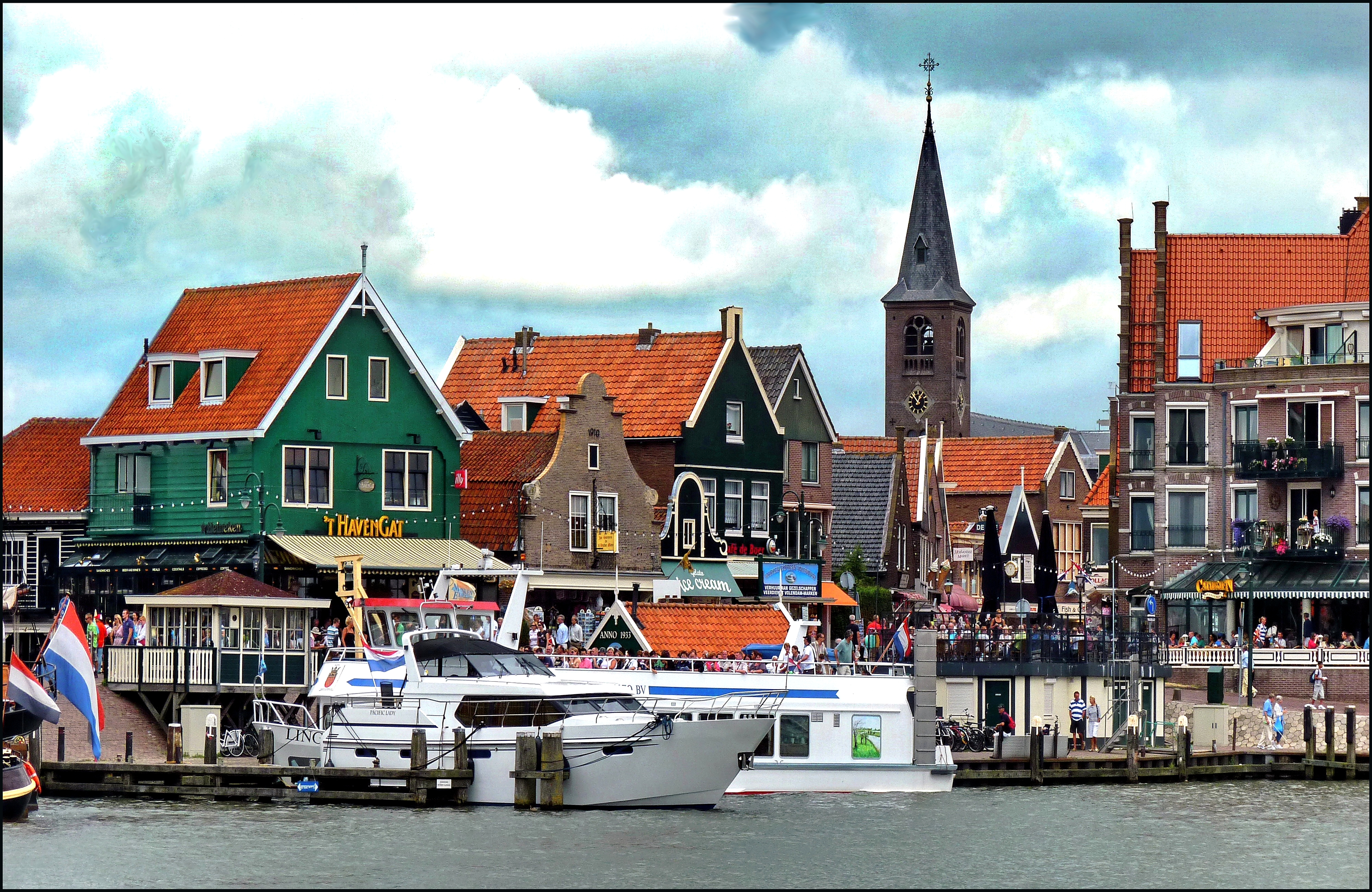 Volendam, Paesi Bassi